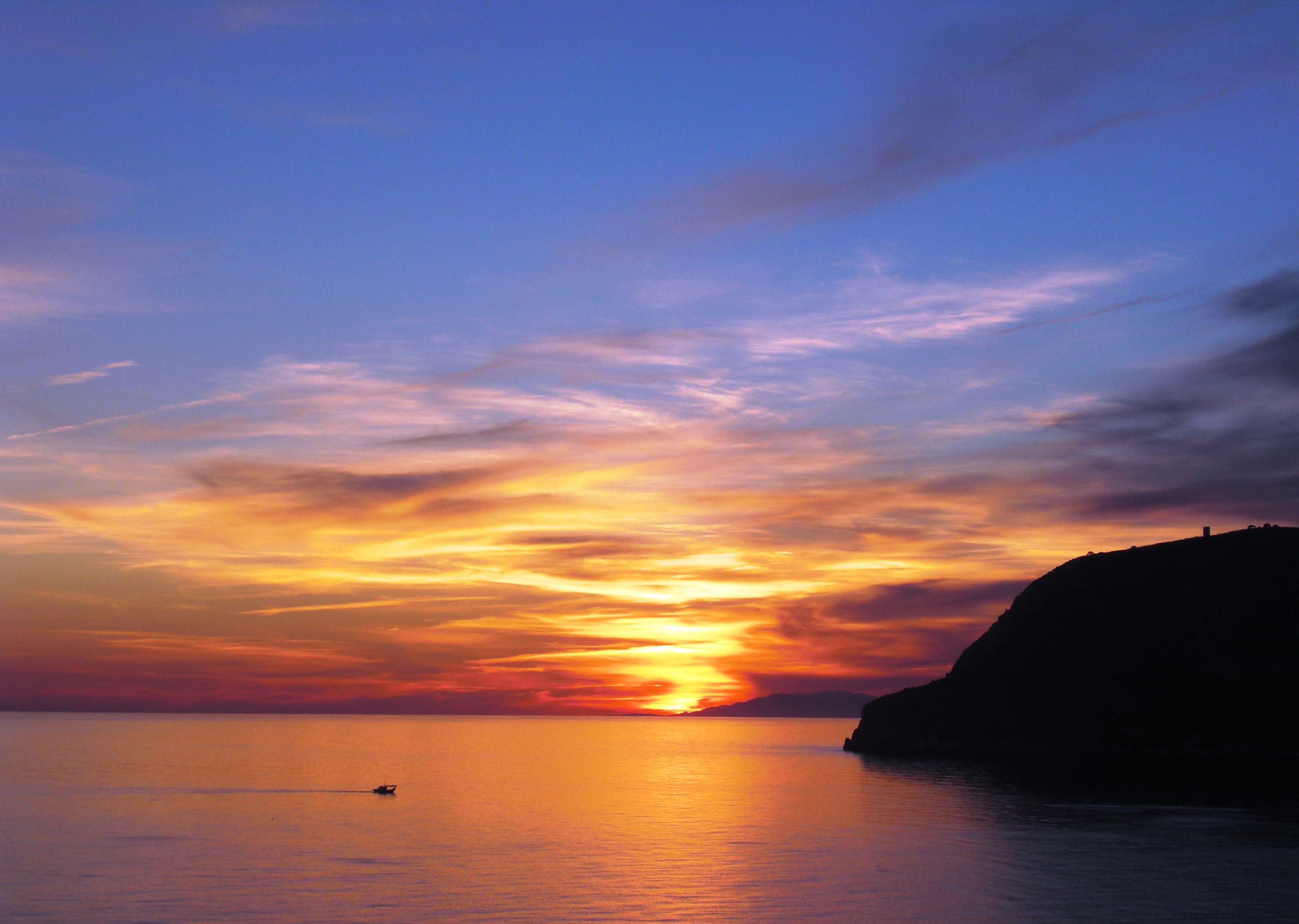 Atardecer invernal en la localidad española de La Herradura (municipio de Almuñécar, Granada). Uno de los mayores lujos de vivir en el pequeño gran pueblo, situado en la Costa Granadina, a cuatro km del límite entre las provincias de Málaga y Granada.